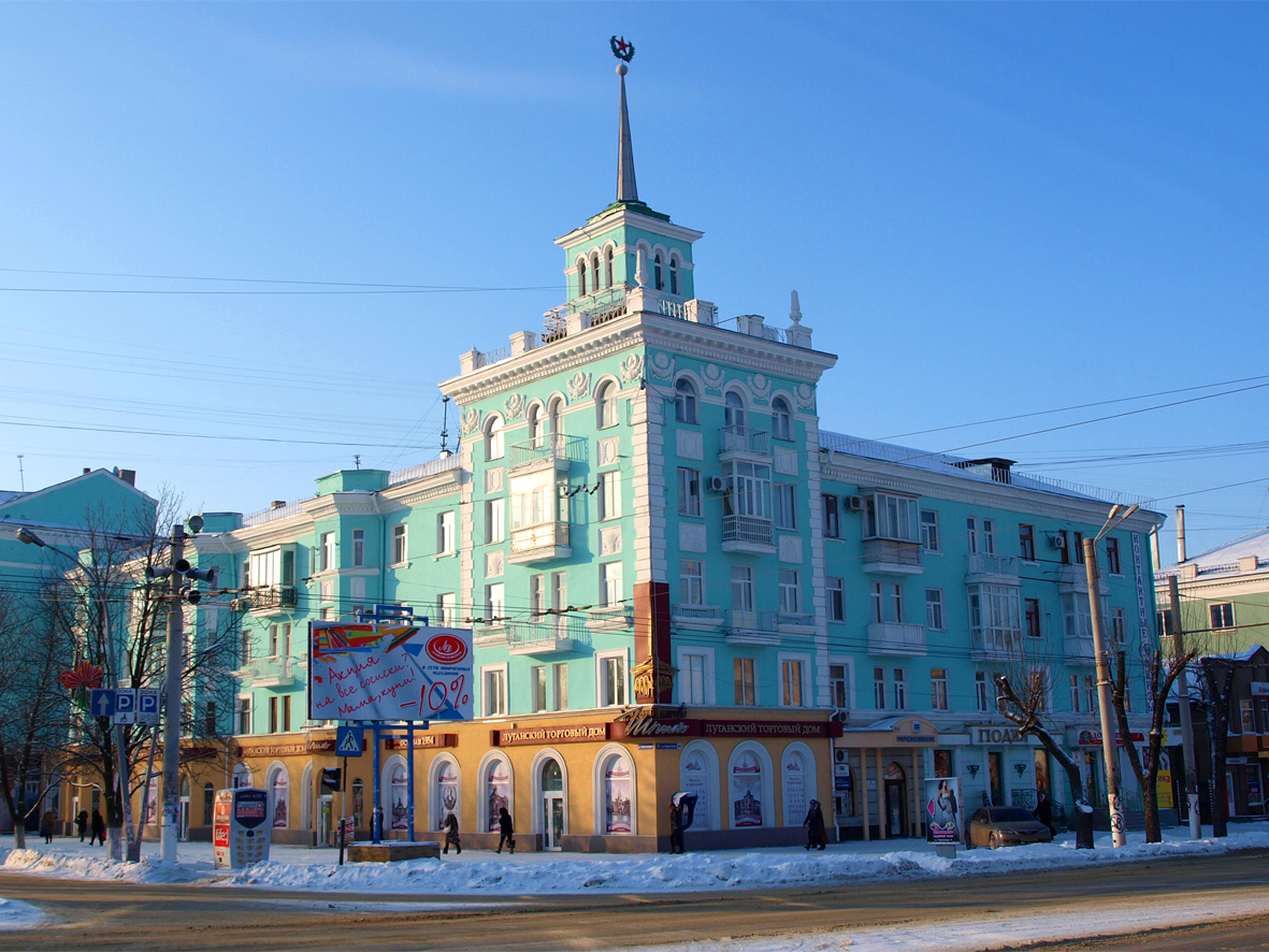 Сталинский ампир на ул.Советской, 64